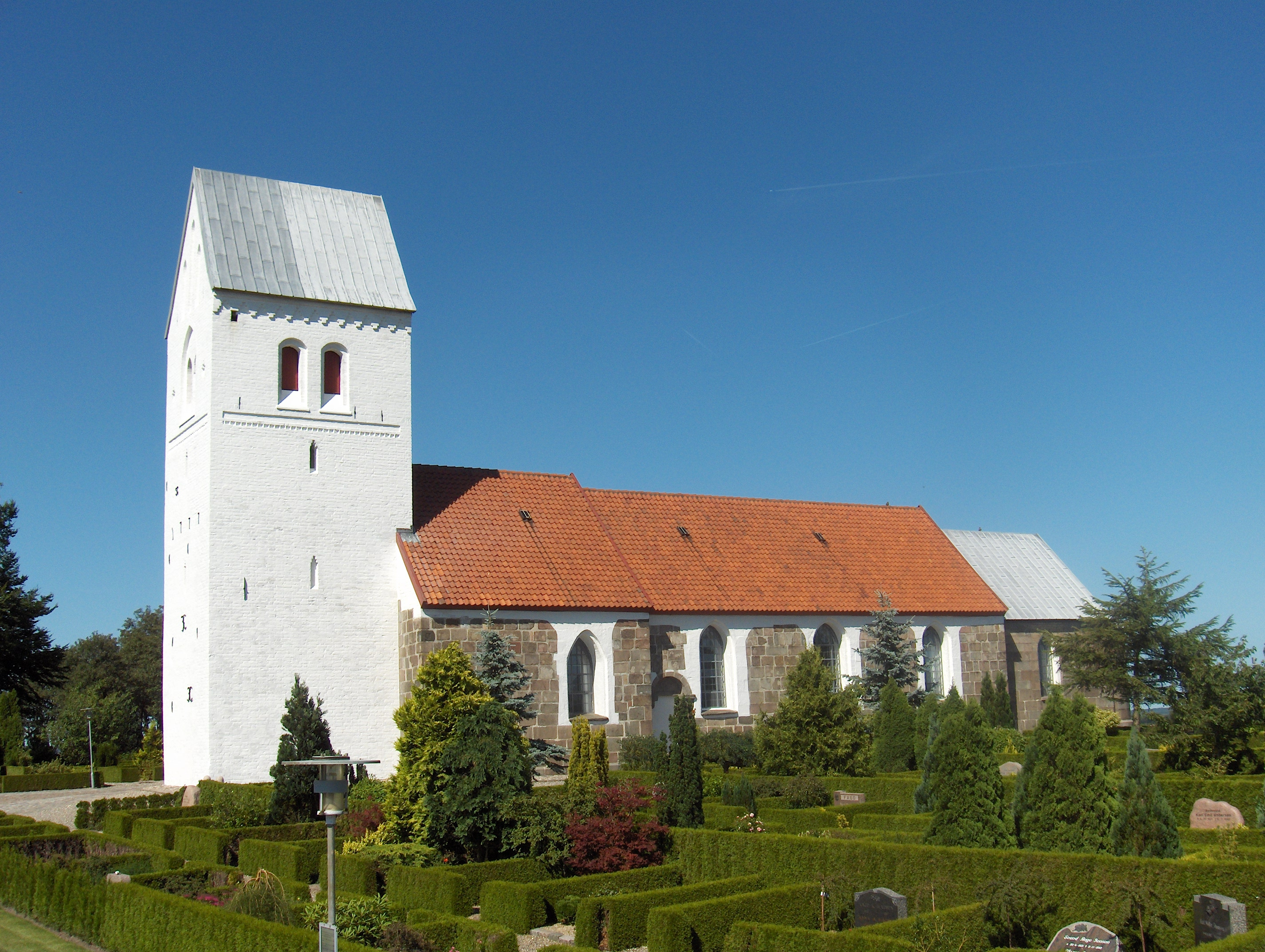 Nørre Tranders Kirke i Aalborg